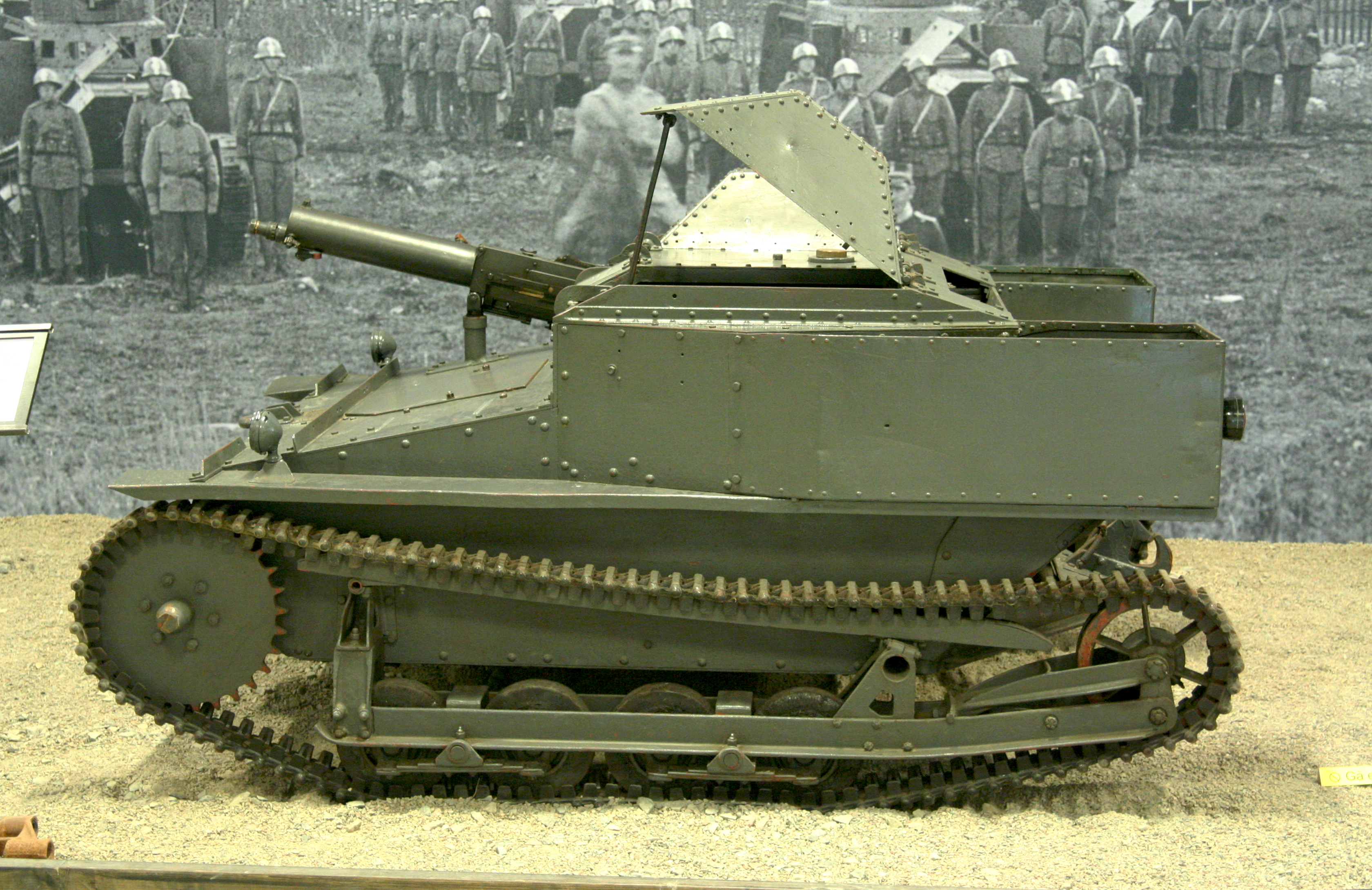 Tankette (Kleinpanzer) Carden-Loyd Mk.VI im Sveriges Försvarsfordonsmuseum - Arsenalen - in Strängnäs am 12.August 2011